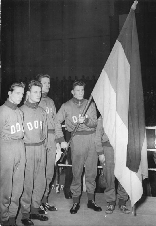 Caroli, Langhammer, Nitzschke, Motzkus Zentralbild Funck 10.12.1955 Ungarischer Boxsieg gegen DDR. In der Leipziger Messehalle II standen sich am Freitag, dem 9. Dezember 1955, im Boxländerkampf die Staffeln der DDR und Ungarn gegenüber. Die Gäste kamen dabei im Gesamtergebnis zu einem 14:6 Erfolg. UBz: . Ein Teil der DDR-Mannschaft kurz nach dem Einmarsch. vlnr: Caroli, Langhammer, Nitzschke und Motzkus.